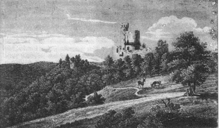 Nový Hrad v roce 1842, nalevo ruina původního hradu, který se nazývá Starý Hrad. Pohled je kreslen z tehdejší obory.